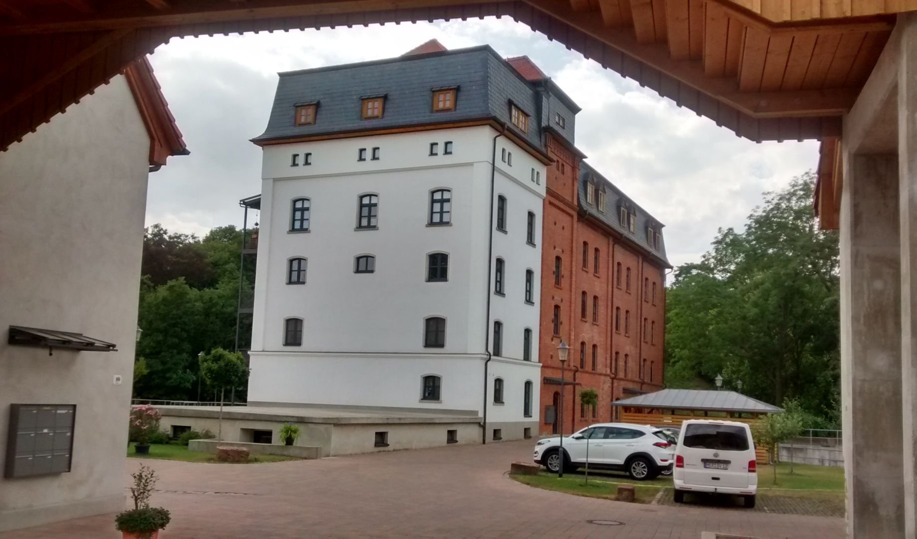 Königsmühle Meuschau